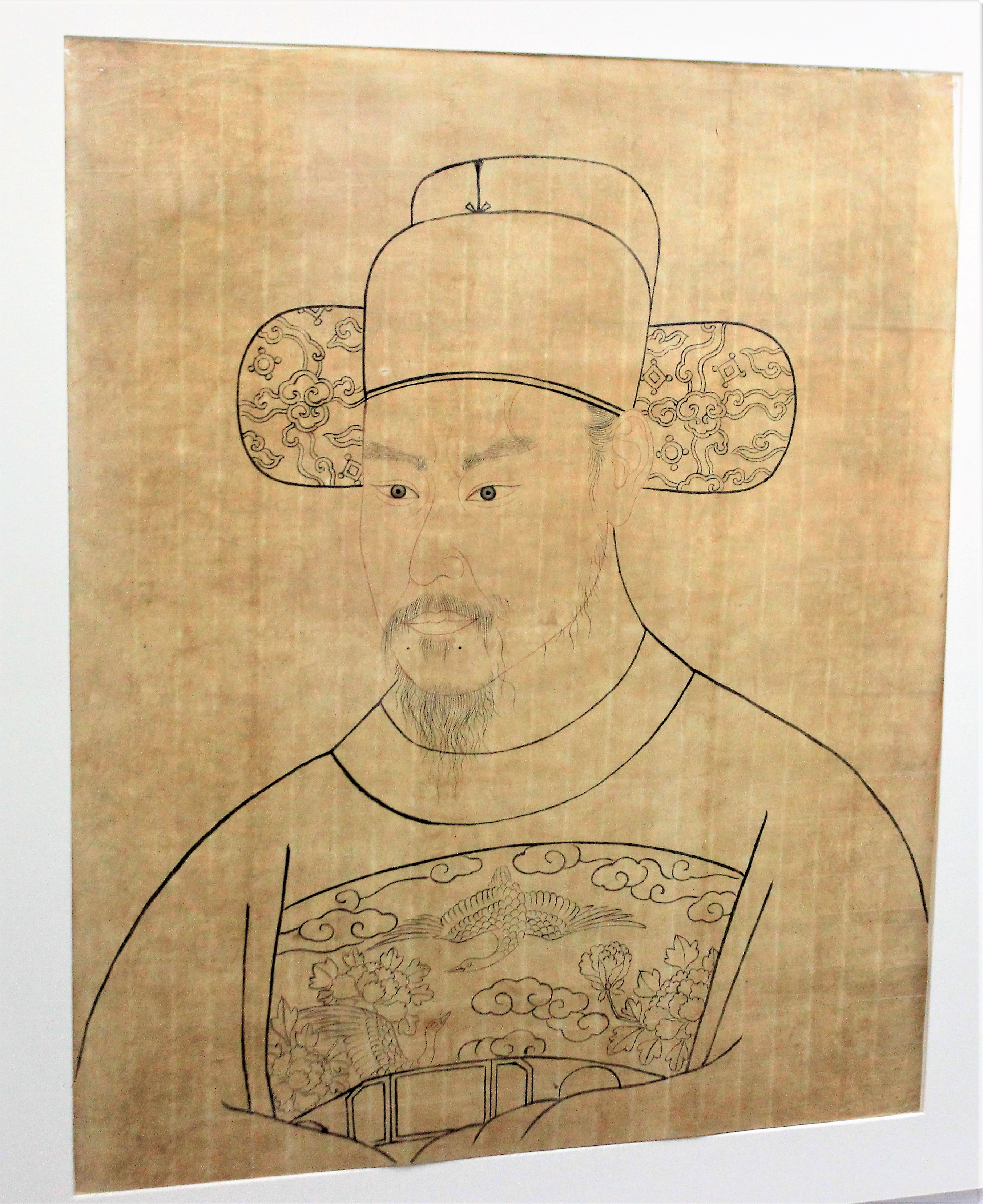 이시방의 초상화 밑그림 (대전광역시 유형문화재 제38호)